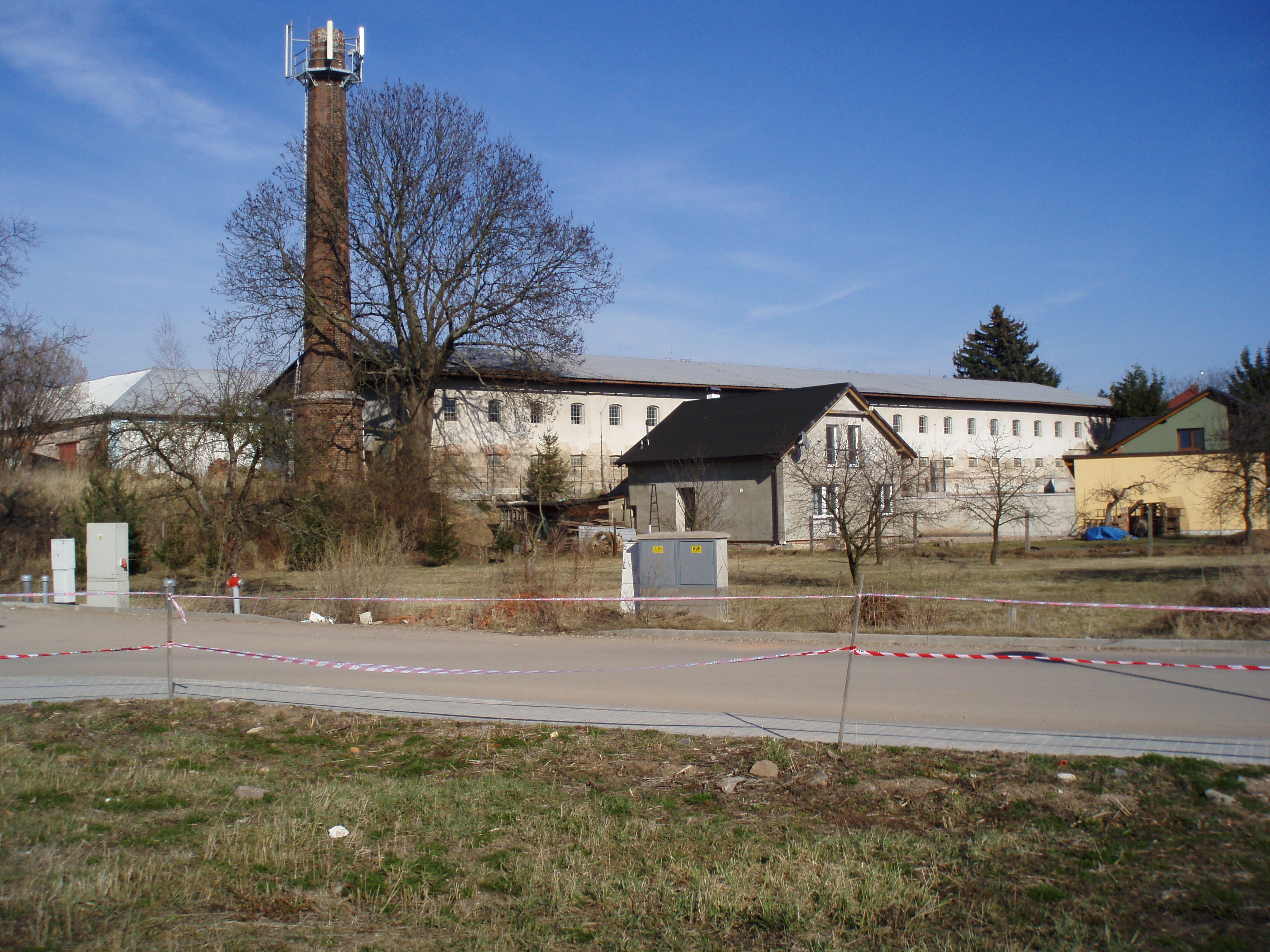 Komárkova zelárna